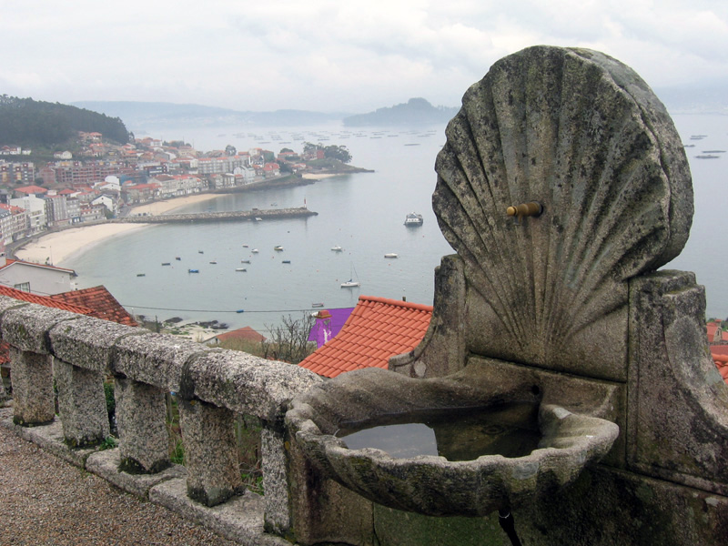 Vista xeral de Raxó (Poio) dende o mirador da Granxa (Sanxenxo)